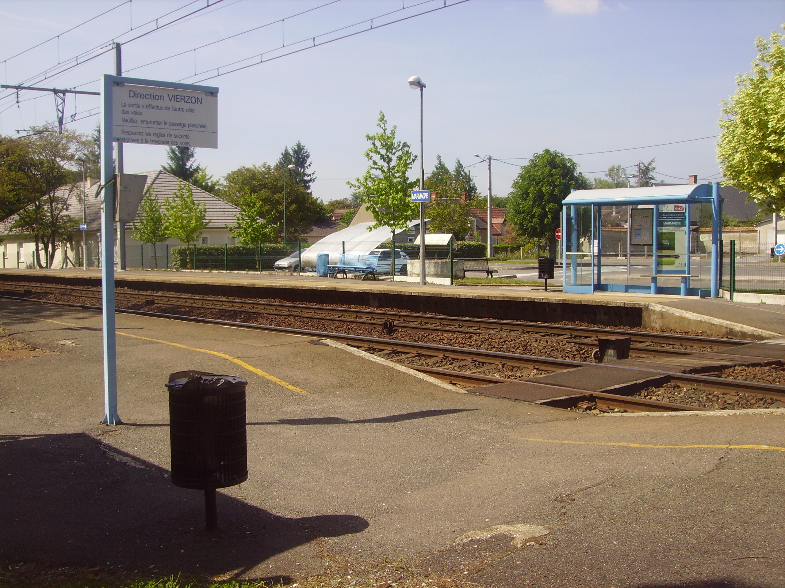 Gare de Marmagne (Cher)